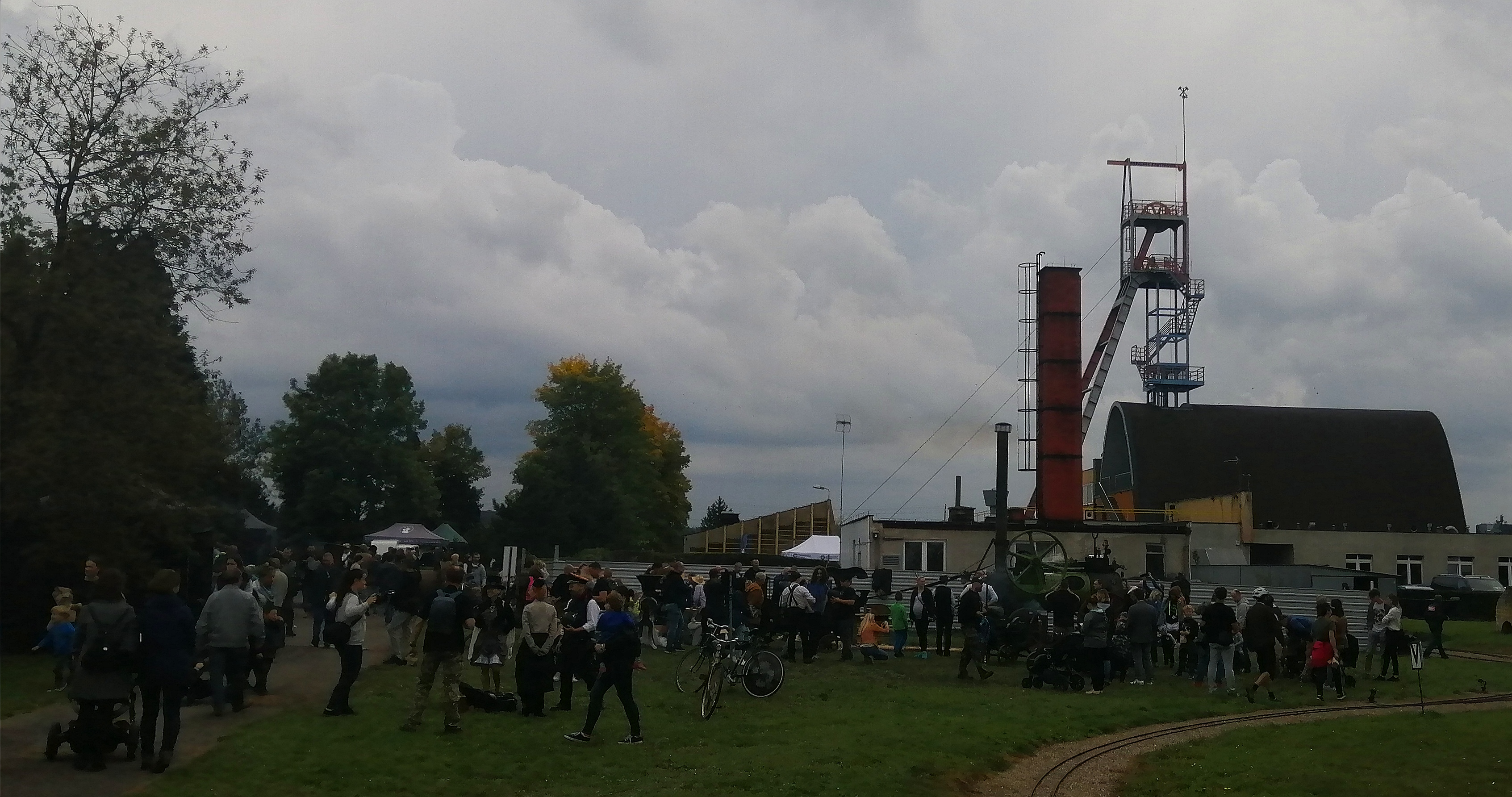 Święto Pary 2019 - skansen maszyn parowych w Tarn. Górach